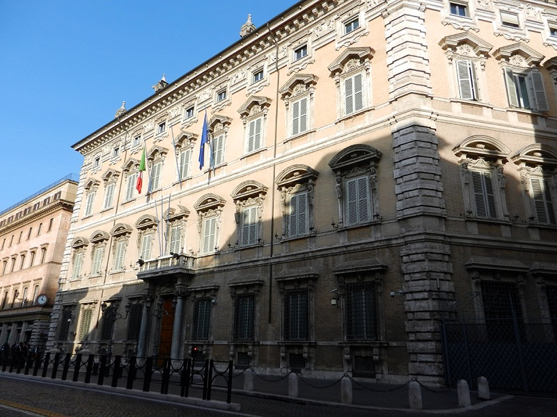 Roma - Palazzo Madama (Senato)